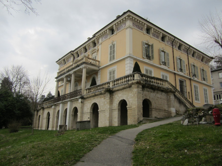 Mairie de Tullins